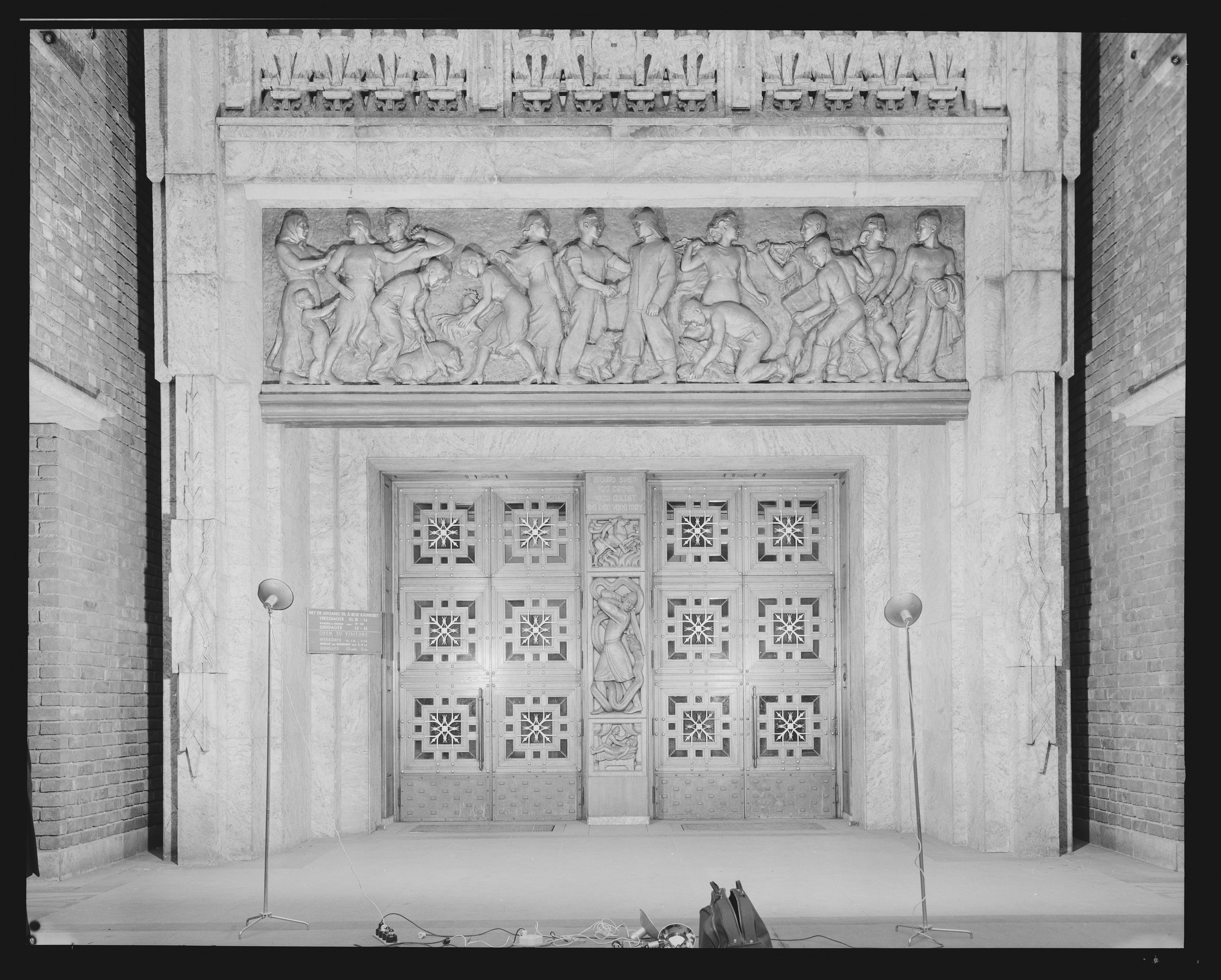 Bildet er hentet fra Nasjonalbibliotekets bildesamling Oslo, Oslo, Oslo